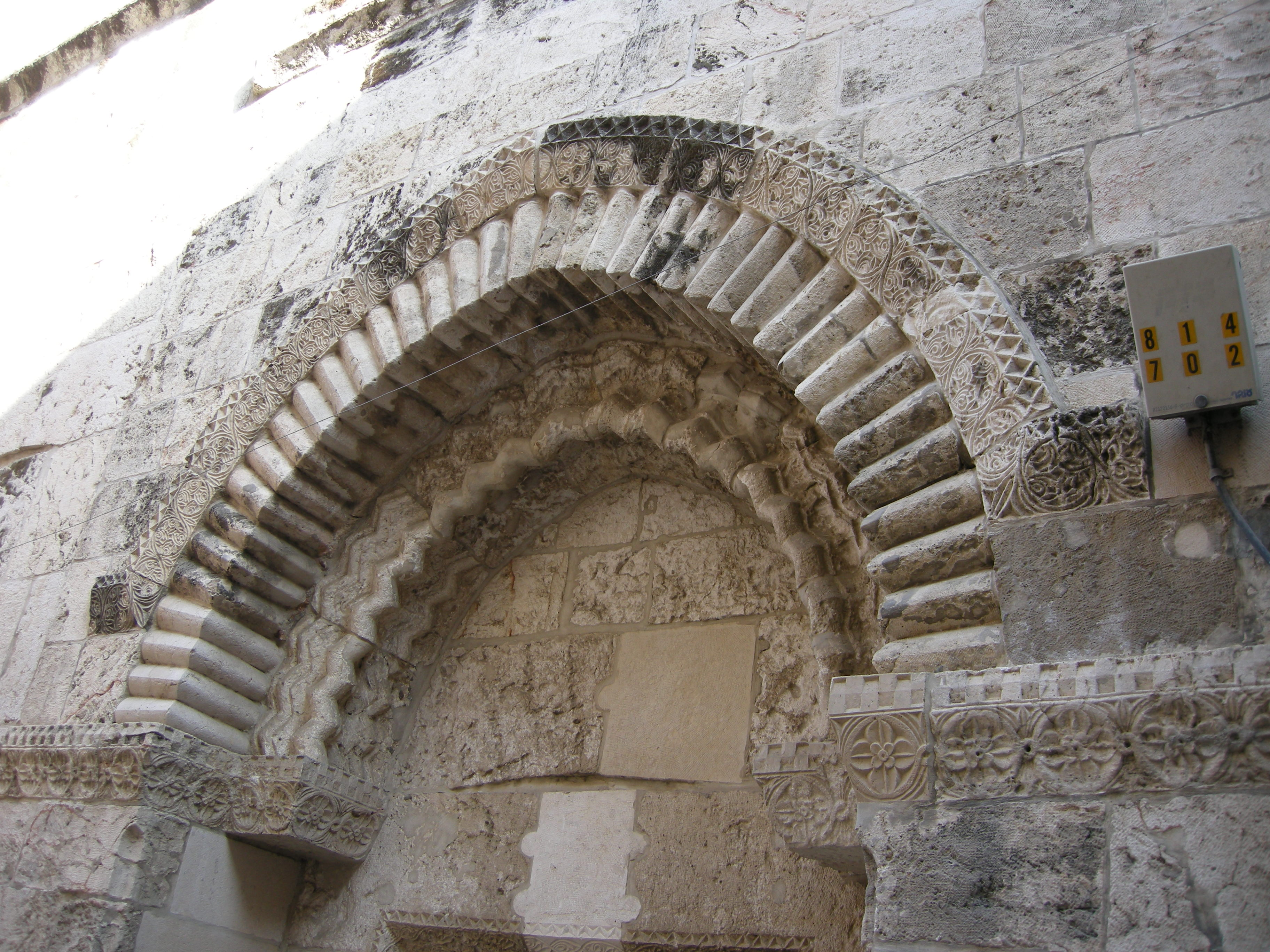 Mamluk impact on Jerusalem